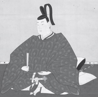 近江仁正寺藩8代藩主・市橋長発の肖像画。